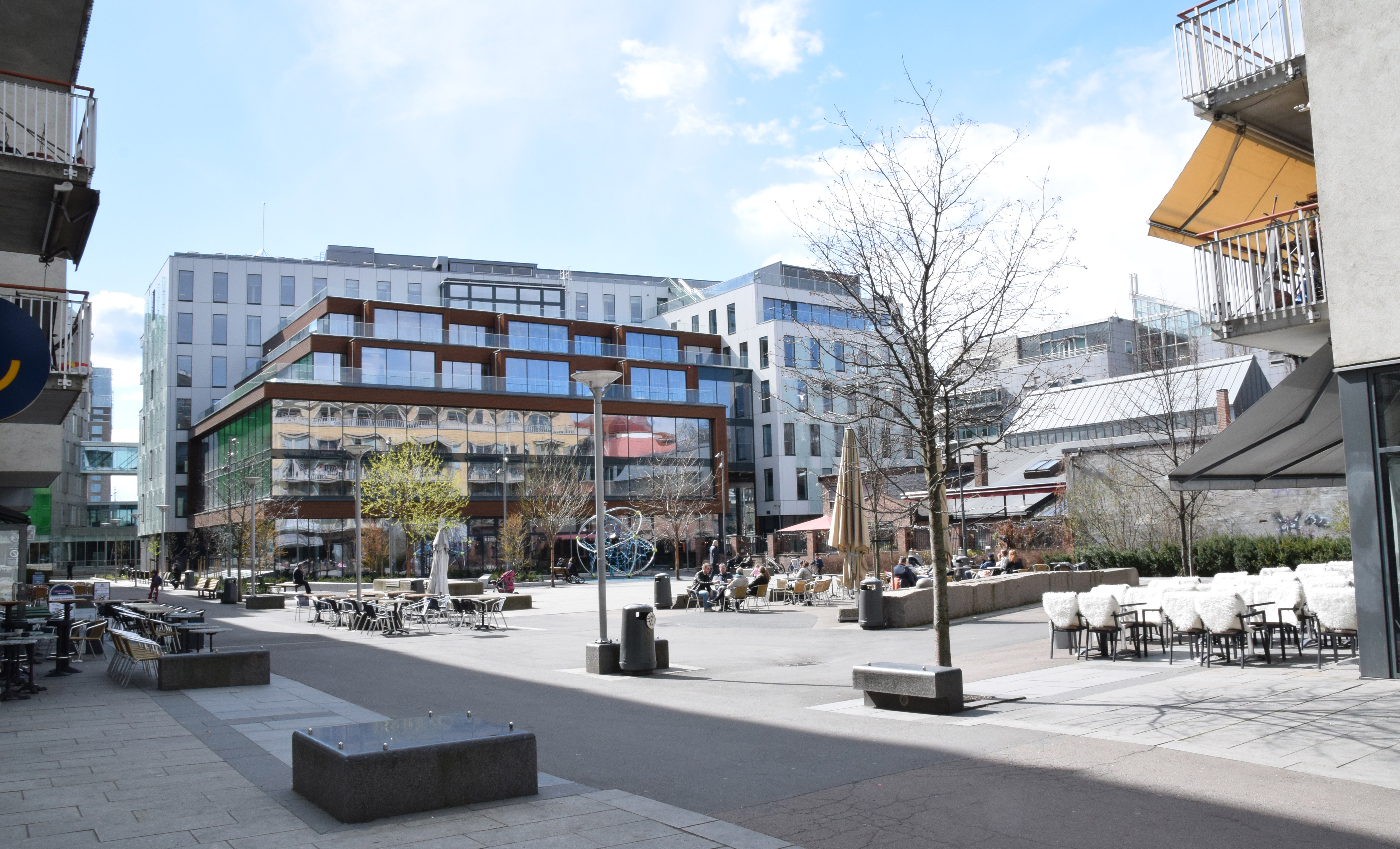 Teaterplassen april 2016. Bygg for Statoil, ferdigstilt 2015, midt i bildet